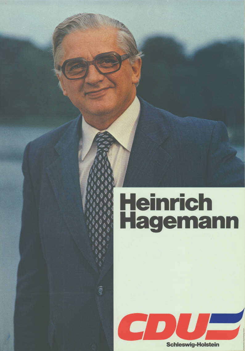 Heinrich Hagmann Mit Kopf und Herz für Schleswig-Holstein Abbildung: Foto Plakatart: Kandidaten-/Personenplakat mit Porträt Auftraggeber: Verantw.: CDU Schleswig-Holstein Objekt-Signatur: 10-012 : 422 Bestand: Landtagswahlplakate Schleswig-Holstein (10-012) GliederungBestand10-18: Landtagswahlplakate Schleswig-Holstein (10-012) » Landtagswahl am 29.4.1979 » Ankündigungsplakate Lizenz: KAS/ACDP 10-012 : 422 CC-BY-SA 3.0 DE